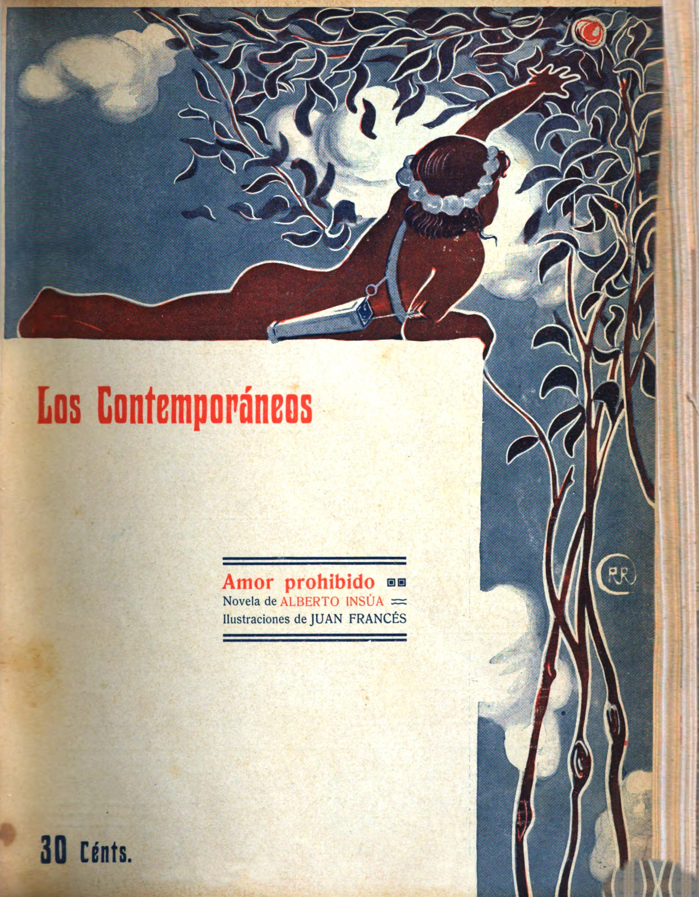 Portada de Amor prohibido.